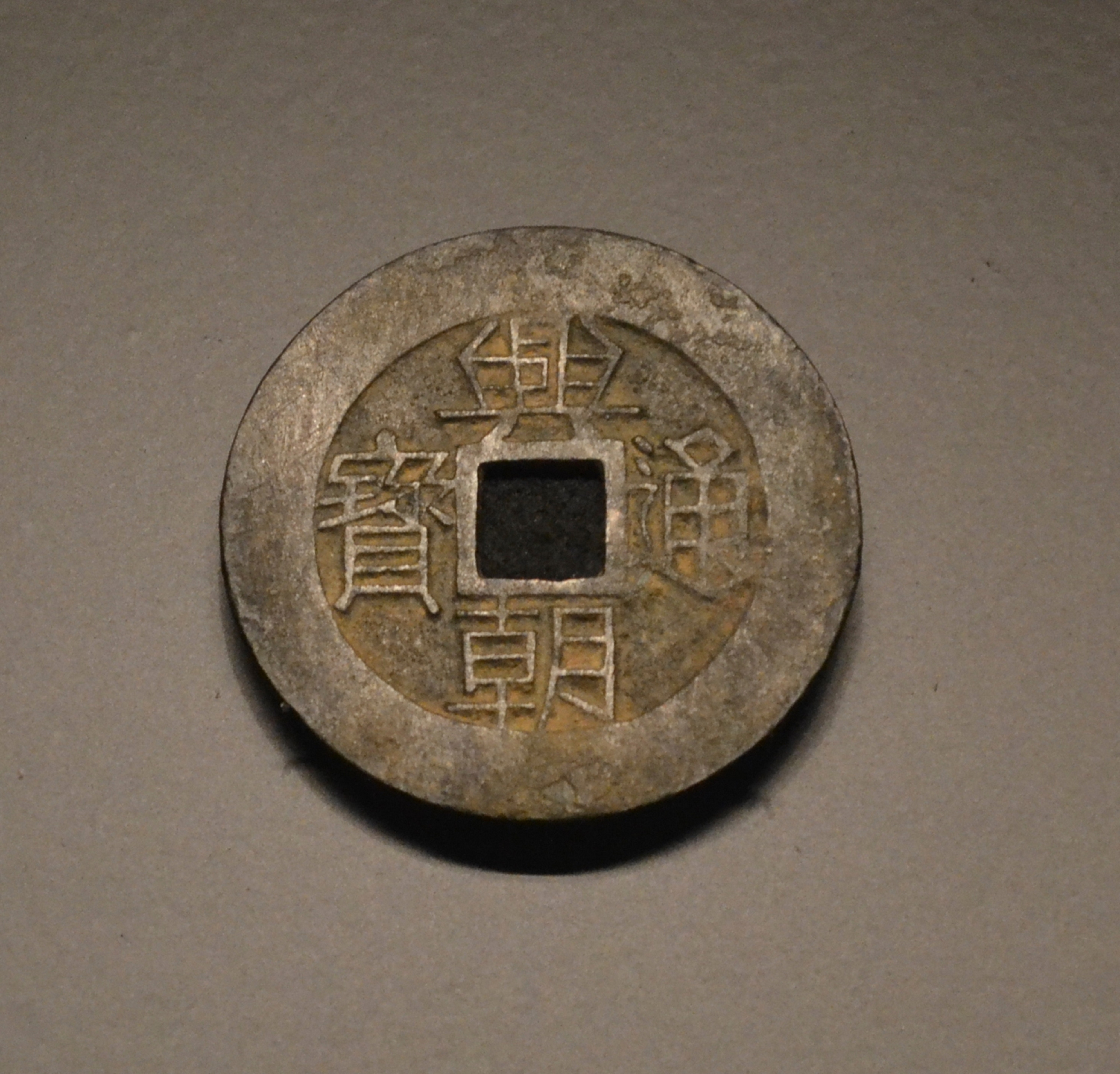 Moneda de la dinastía Ming (1644). Museo de Prehistoria de Valencia.